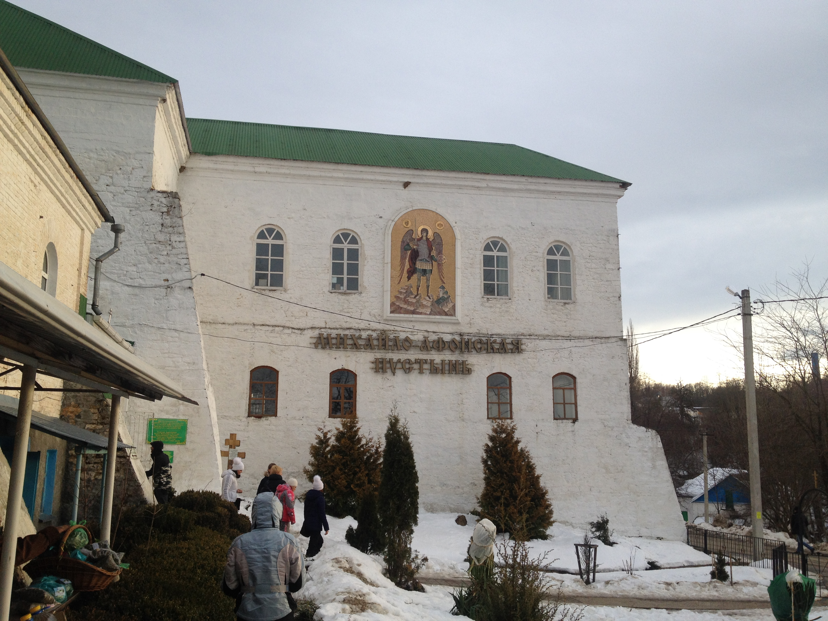 Свято-Михайловский монастырь, январь 2017 года